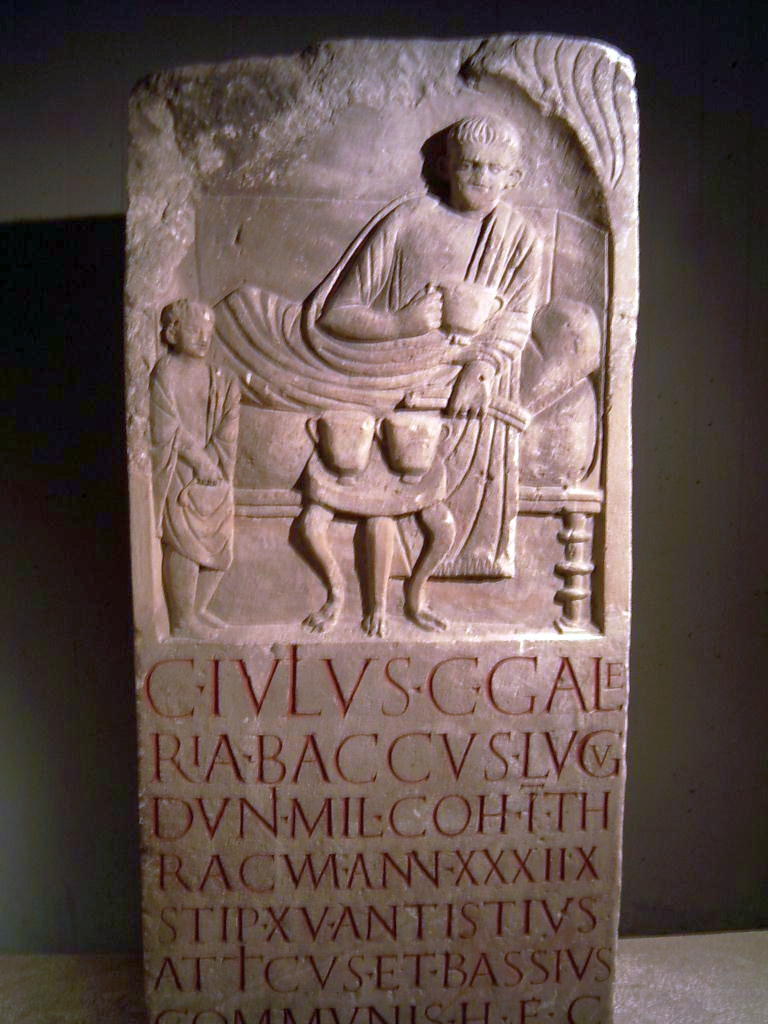 Grabmal des Kohortensoldaten Caius Iulius Cai Galeria Baccus. Julius Baccus war Soldat der ersten thrakischen Kohorte, die im heutigen Bulgarien aufgestellt worden war. Diese stand im 1. Jh. nach Chr. eine Zeitlang auch in Bonn (Bonna).